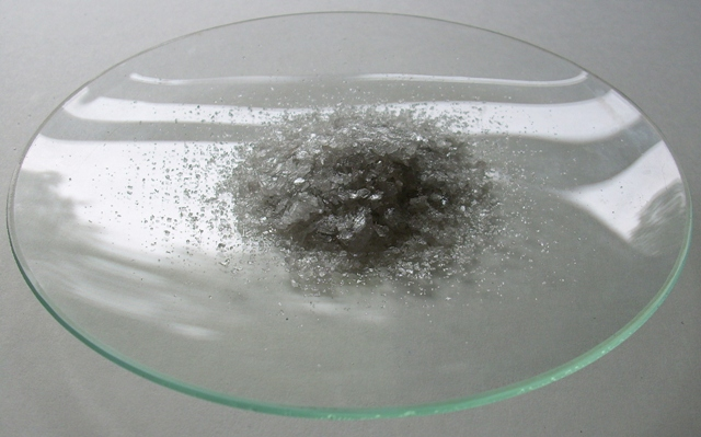 AgNO3